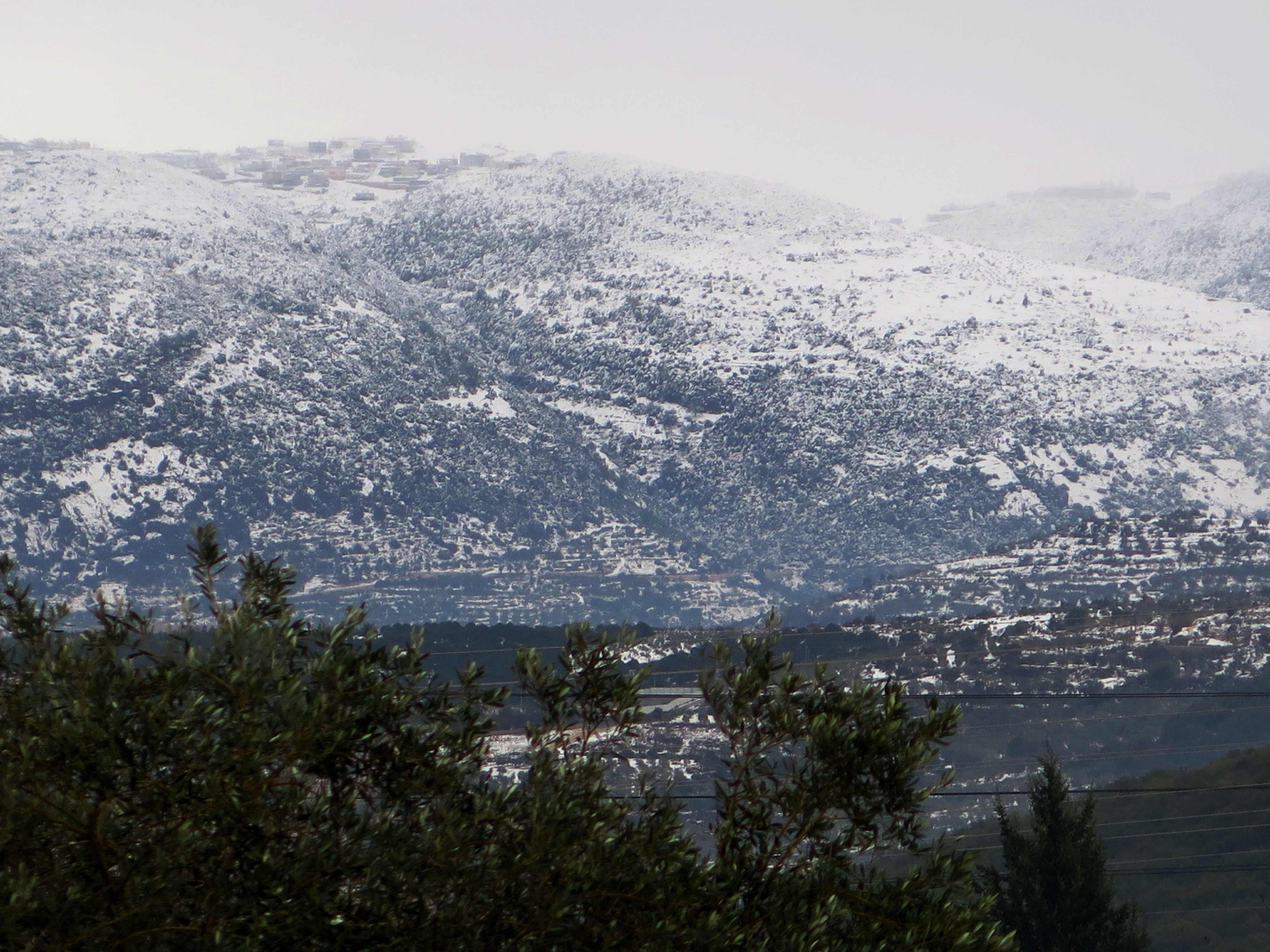 שלג בגליל העליון . צילום מהכניסה לאזור התעשייה בתפן מבט לכיוון צפון מזרח רכס הרי מירון